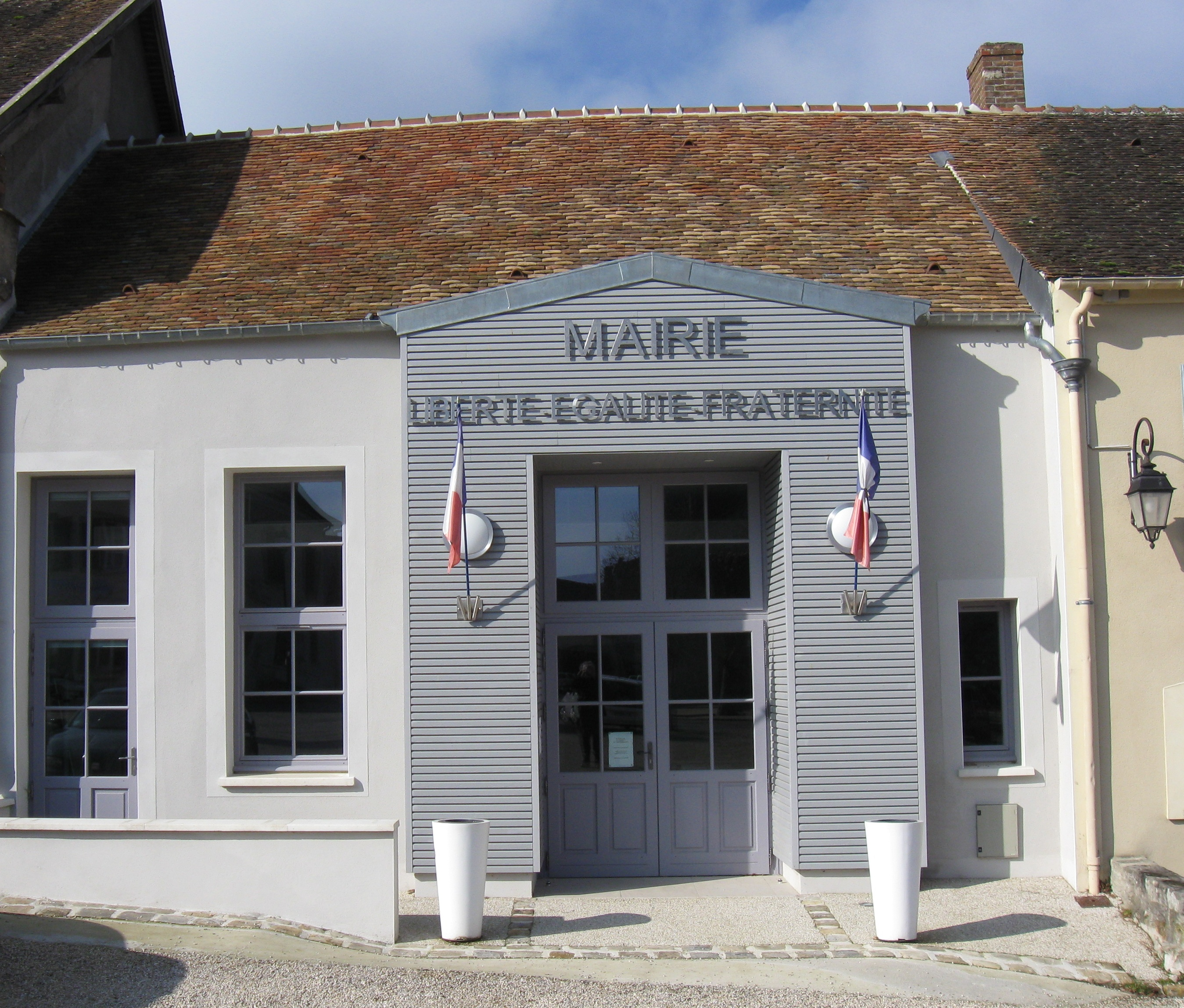 Mairie de Flagy. (Seine-et-Marne, région Île-de-France).